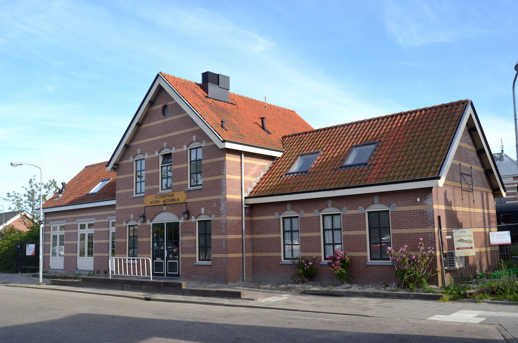 Tramstation Hoorn noordzijde; 18 juli 2015. Foto: Erik Swierstra